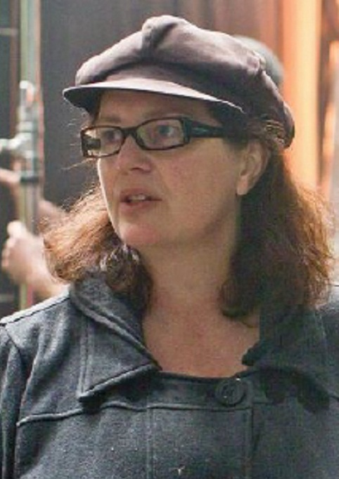 Philippa Boyens